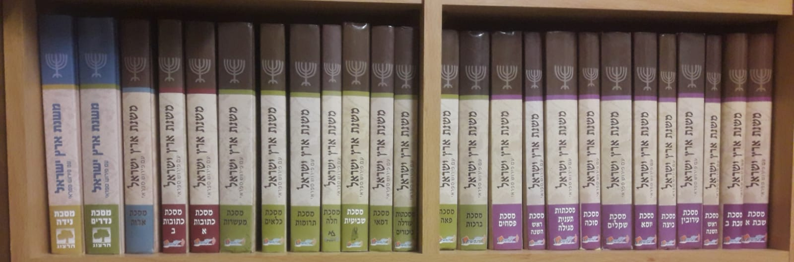 ספרי המשנה על מדף הספרים